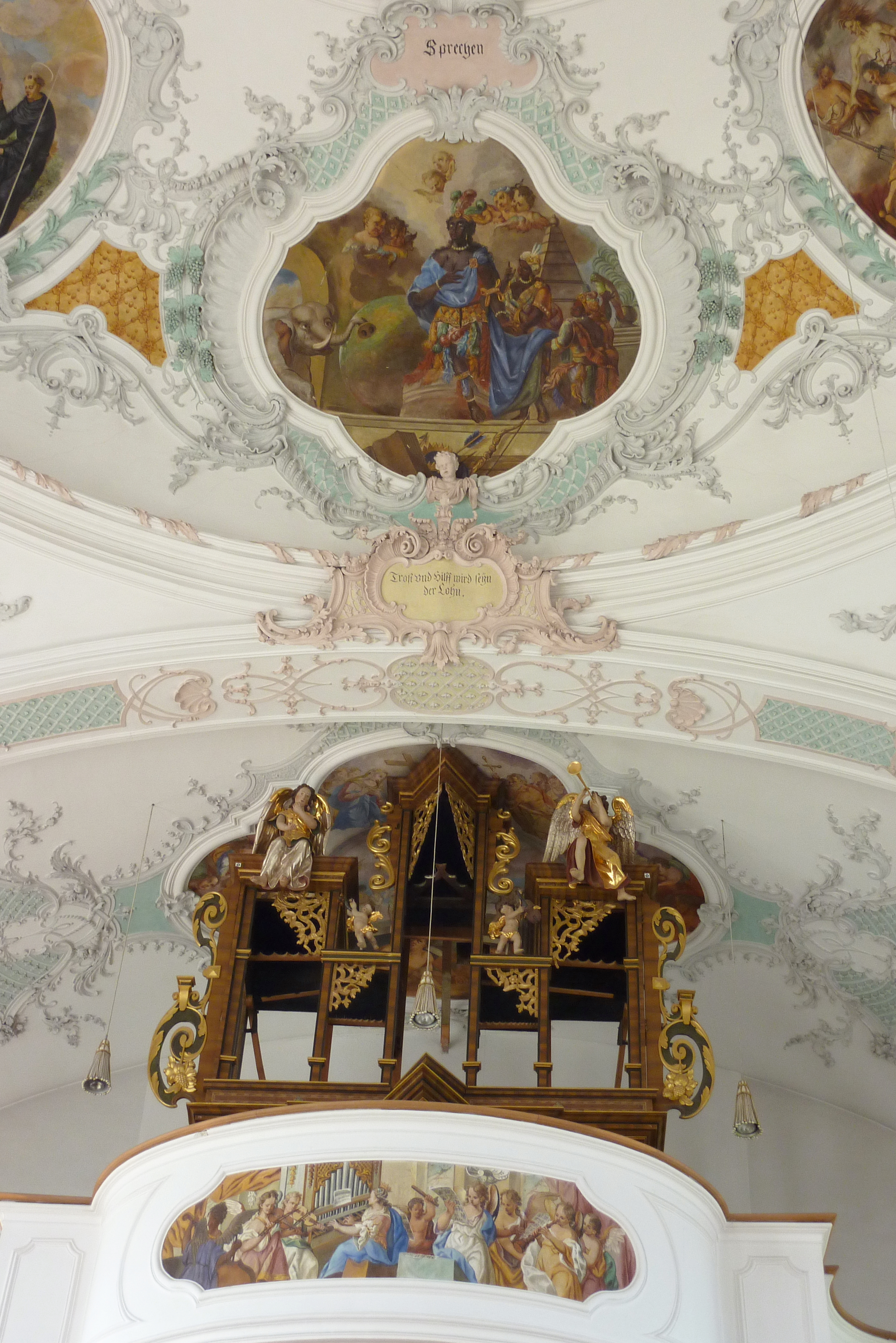 Katholische Pfarrkirche St. Martin in Gabelbach, einem Ortsteil von Zusmarshausen im Landkreis Augsburg (Bayern), Deckenfresken um 1738, wohl von Alois Mack, Stuckdekor Johann und Ignaz Finsterwalder zugeschrieben, von 1738 (überarbeitet), Renaissance-Orgelgehäuse, Orgel von Max Günzer, von 1609